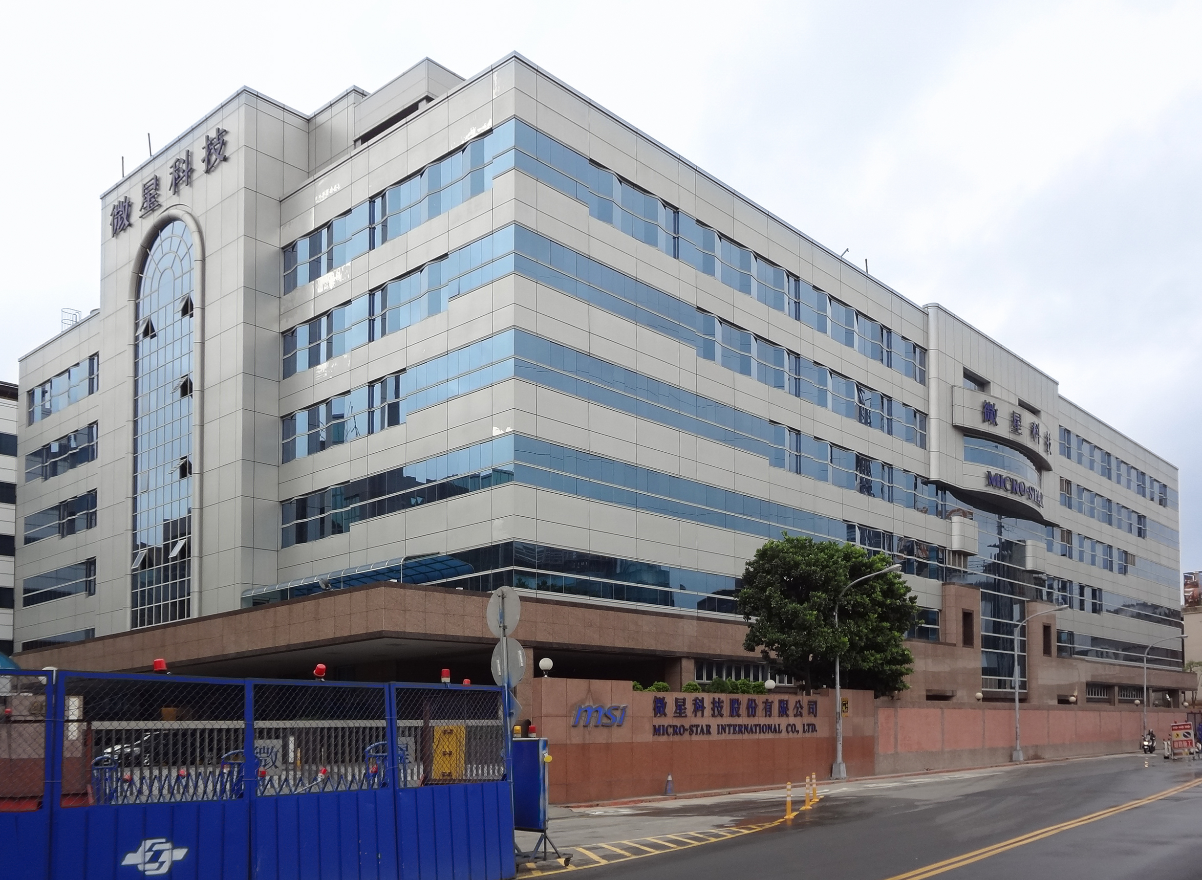 中文（台灣）: 微星科技中和廠，位於臺灣新北市中和區板南路488號。